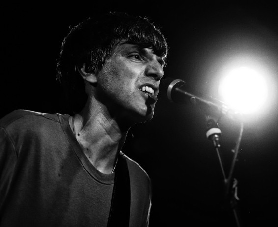 Bugo in concerto nel 2018